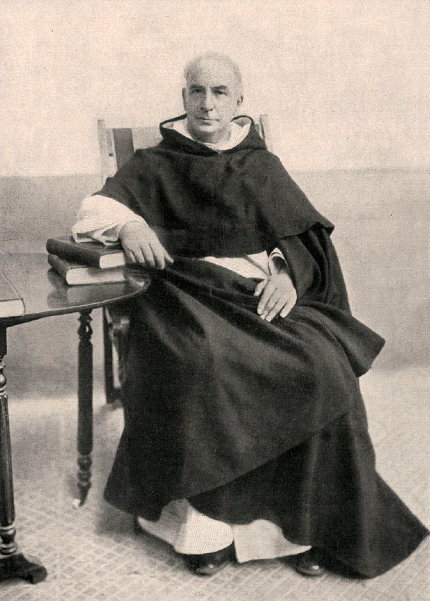 Crescente Errázuriz en su época cuando era Superior en la Iglesia de la Recoleta Dominica. Crescente José de los Dolores de María Santísima Errázuriz Valdivieso (Santiago de Chile, 28 de noviembre de 1839 - ídem, 5 de junio de 1931) fue un religioso chileno, Arzobispo de Santiago.